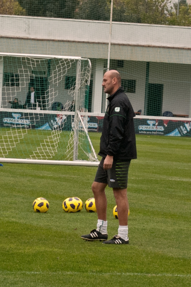 Roberto Ríos, segundo entrenador del Real Betis Balompié, en la temporada 2010-11, durante un entrenamiento del equipo en la ciudad deportiva.